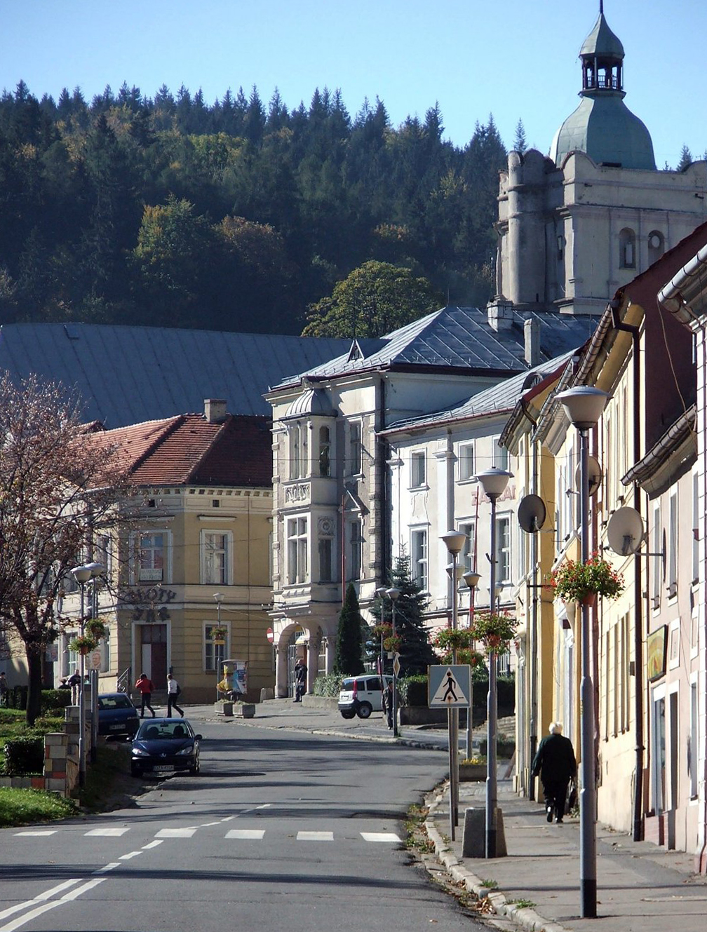 Złoty Stok (woj. dolnośląskie, powiat ząbkowicki), widok na rynek